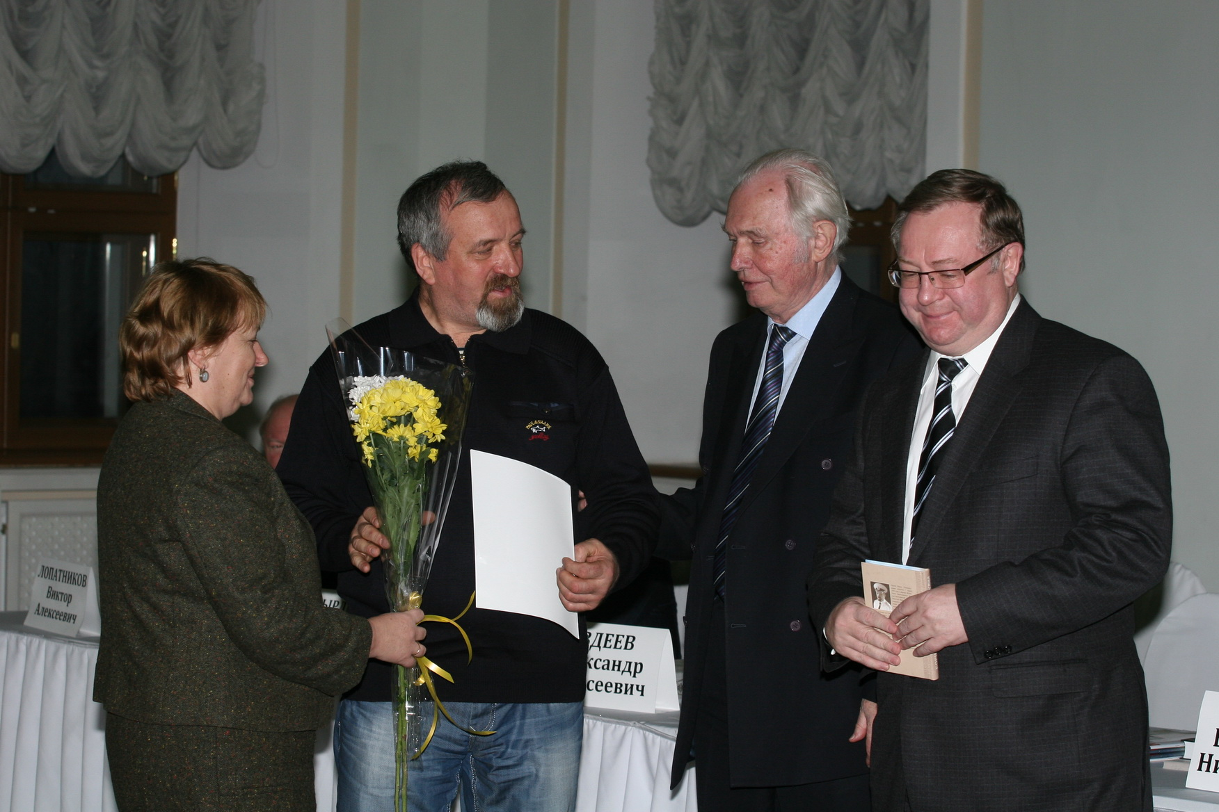 1-го декабря 2011 года в Российской Государственной библиотеке («Дом Пашкова») состоялась торжественная церемония вручения Большой литературной премии России за 2011 год